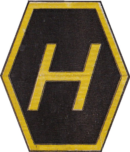 Klistermärke för "Dagen H" (högertrafikomläggning)